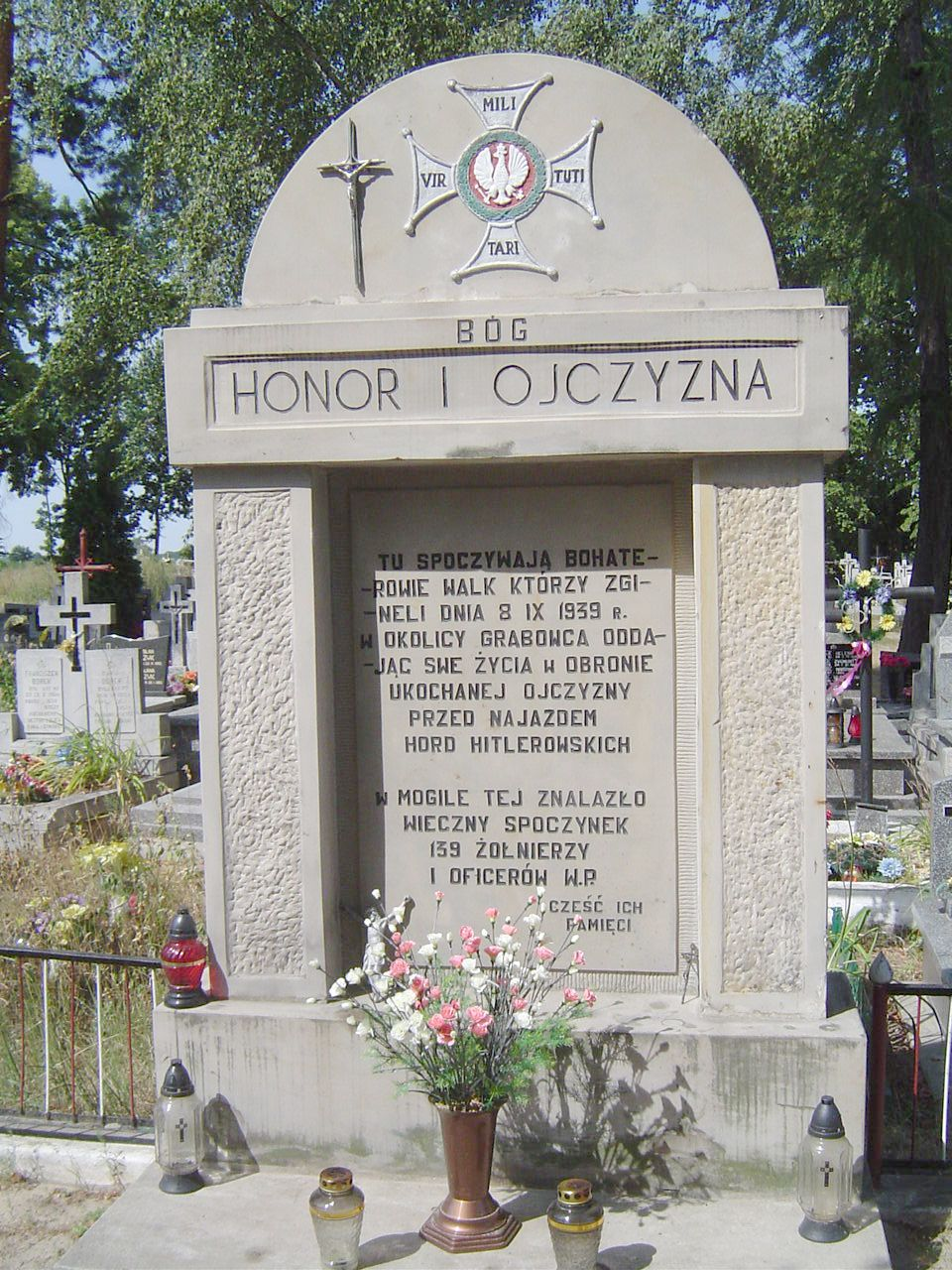 Pomnik-mogiła żółnierzy polskich poległych 8.09.1939